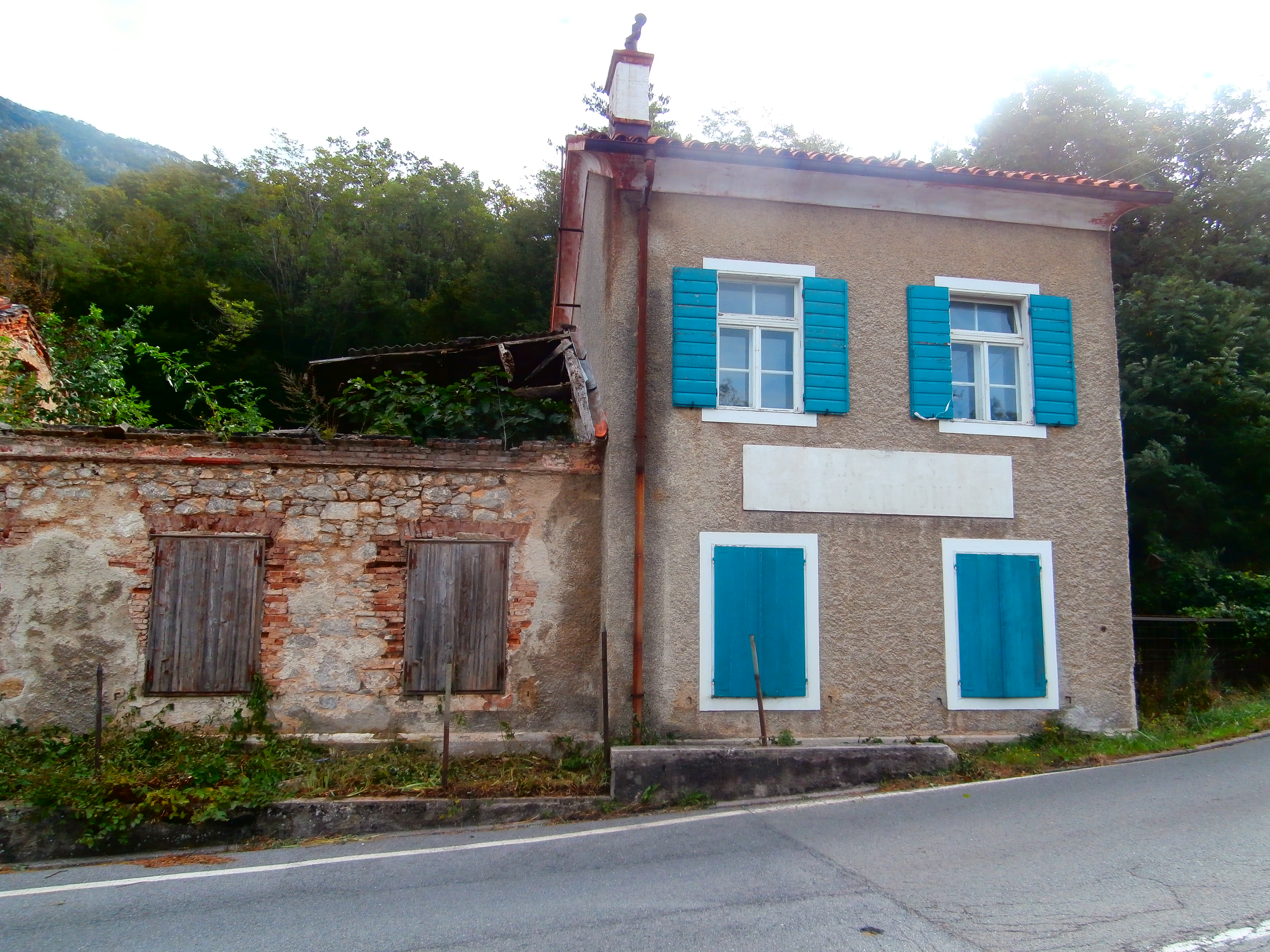 Antica casa cantoniera della SS 57 presso Prevallo